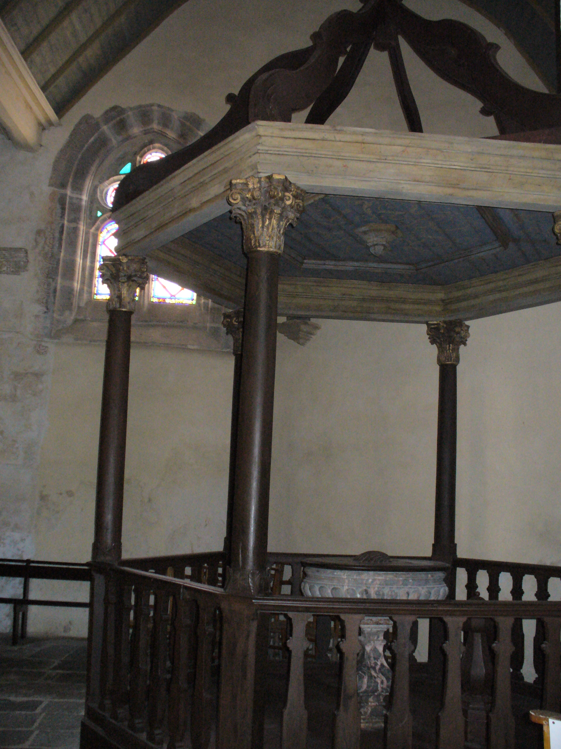 Taufbecken-Eglise Notre Dame de Saint Thegonnec(1600-1800)